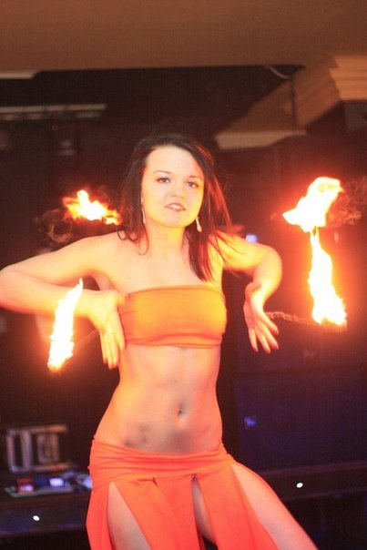 огненно шоу экстрим театра